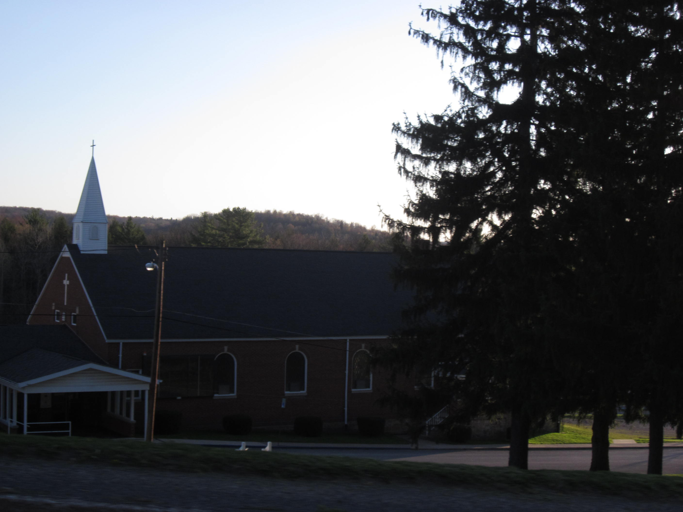 Ashville, Pennsylvania